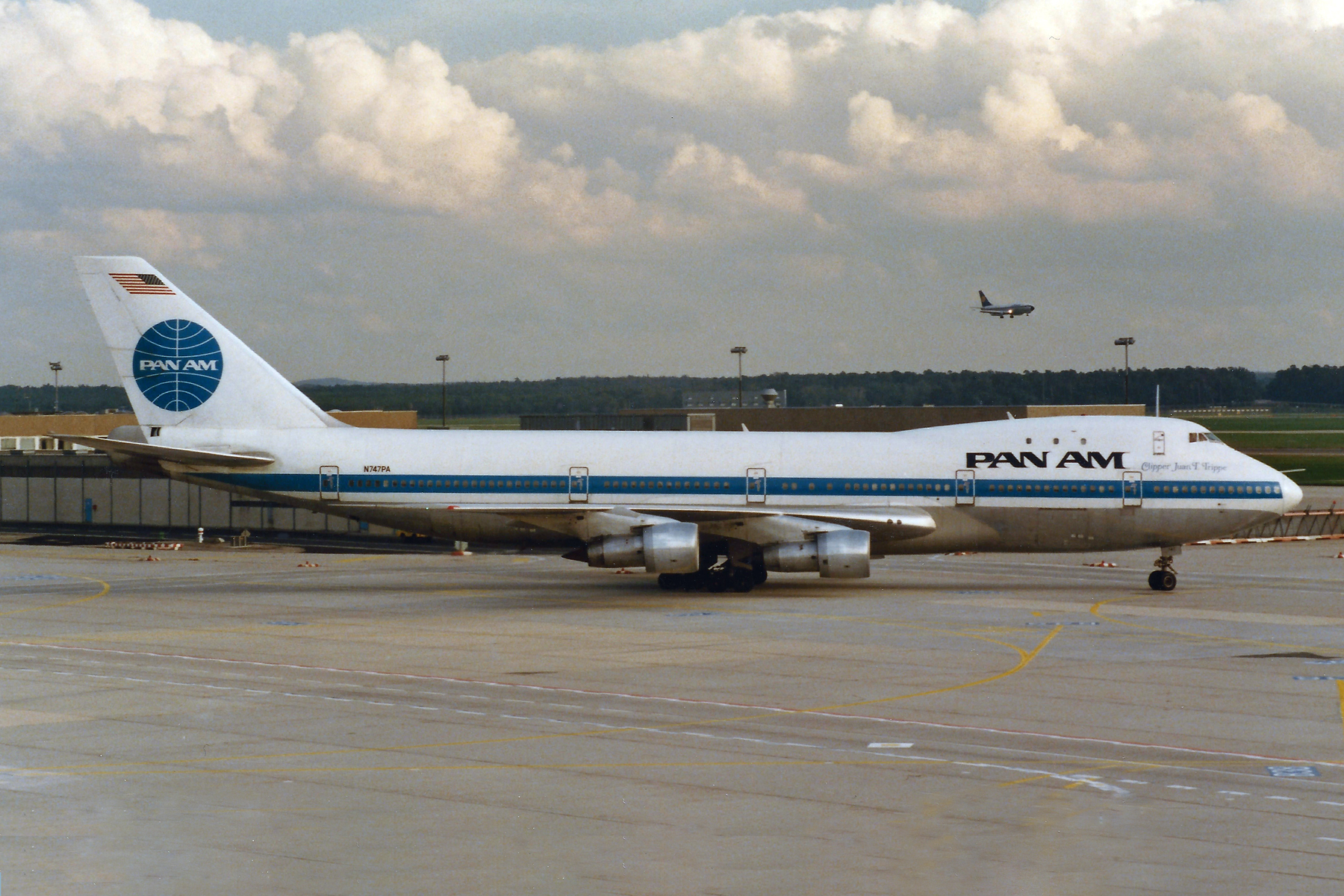 Frankfurt am Main (Rhein-Main AB) (FRA / EDDF / FRF) Germany 10.1984